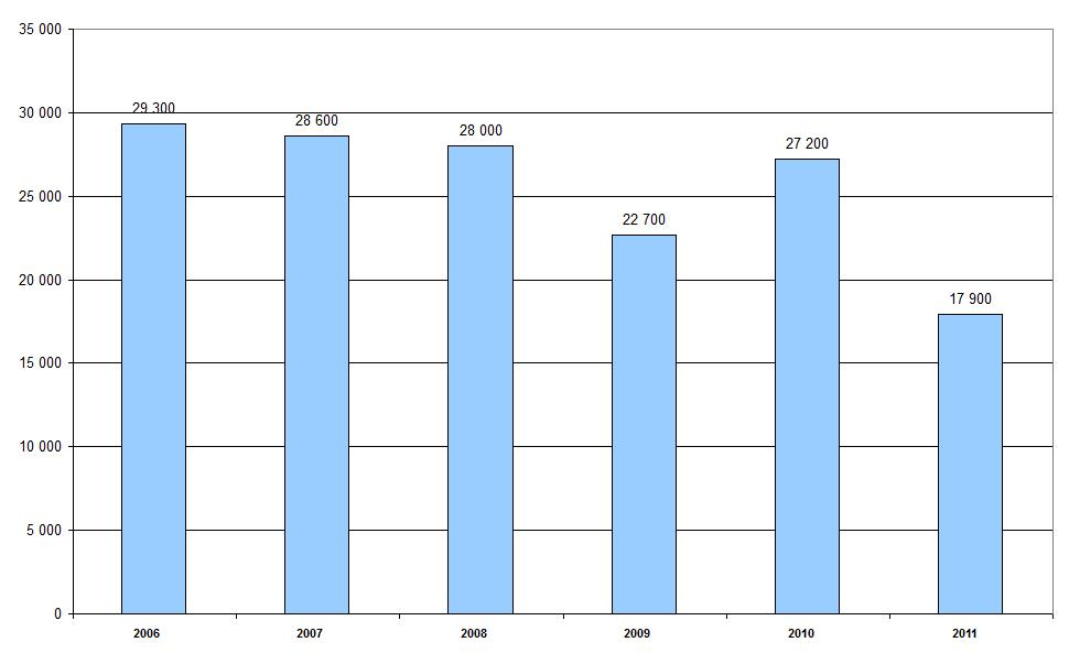 Prix d'achat moyen d'une habitation, à Hartford (Michigan, Etats-Unis).